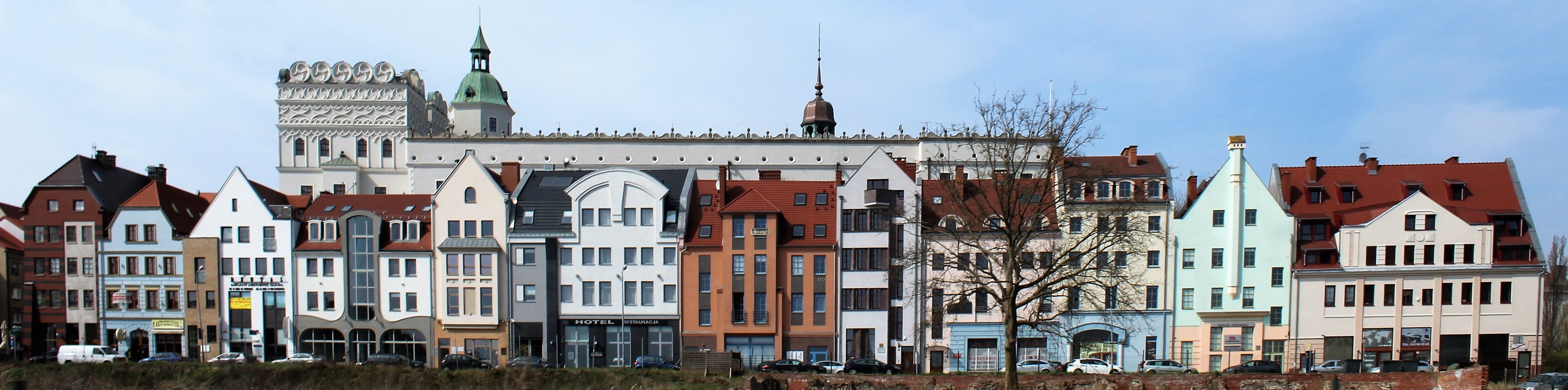 Ulica Panieńska w Szczecinie, 2015